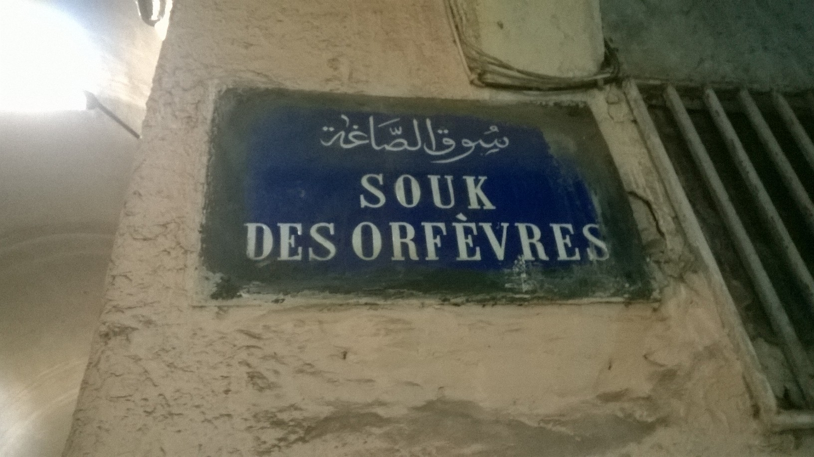 La médina de Tunis مدينة تونس العتيقة